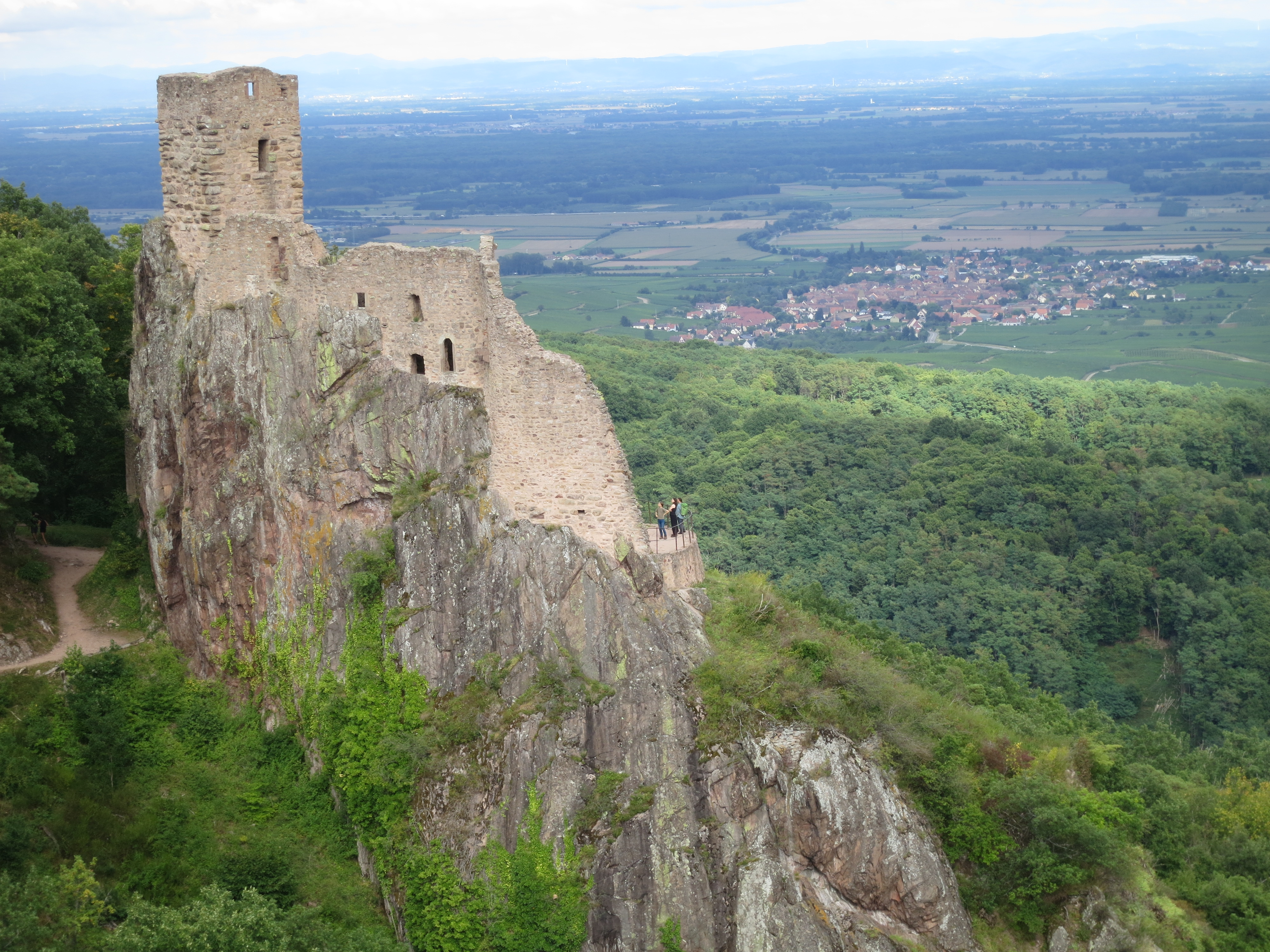 Chateau du Girsberg - 2017